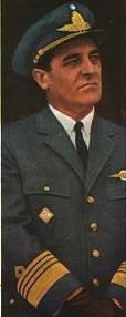 Brigadier General Adolfo Teodoro Álvarez